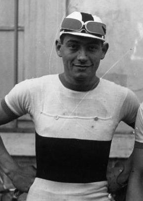 Jean Goujon, V.C.L, Course cycliste Paris-Evreux